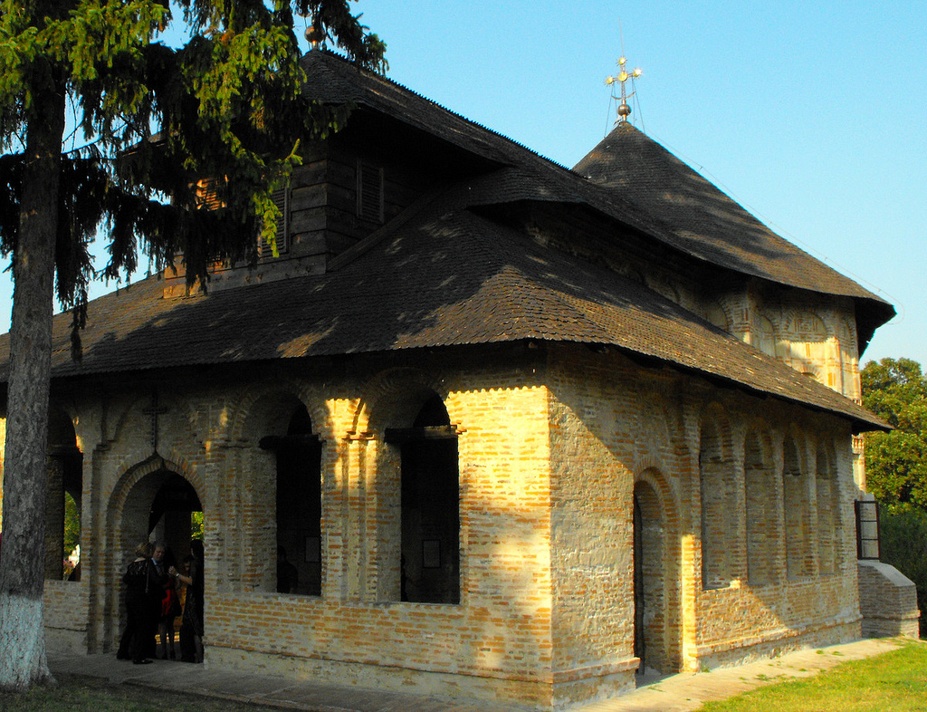 Biserica " Sf. Nicolae" a fostului schit Bălteni